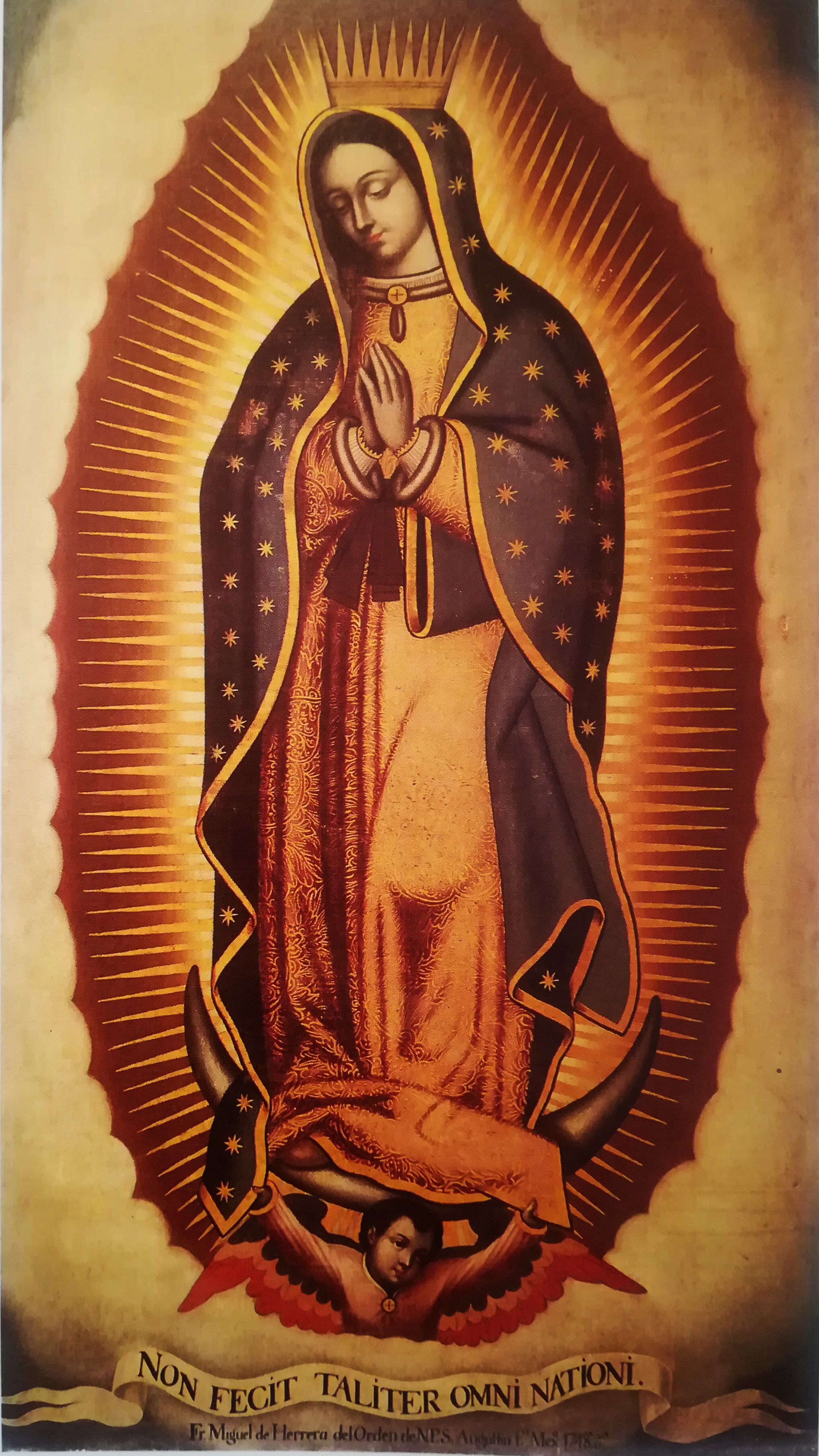 Virgen de Guadalupe. Beaterío de la Santísima Trinidad. Sevilla, Andalucía, España.